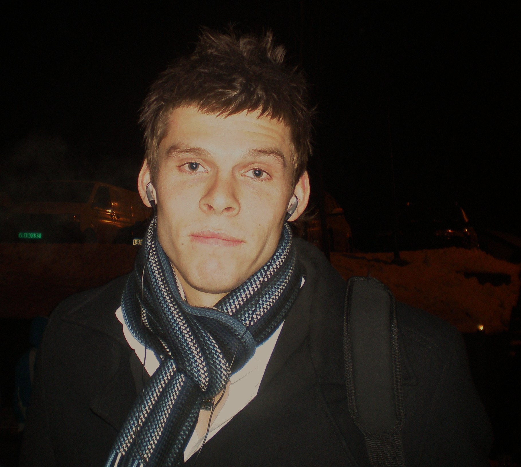 Portrait von Rune Jarstein, Torwart von Rosenborg Trondheim